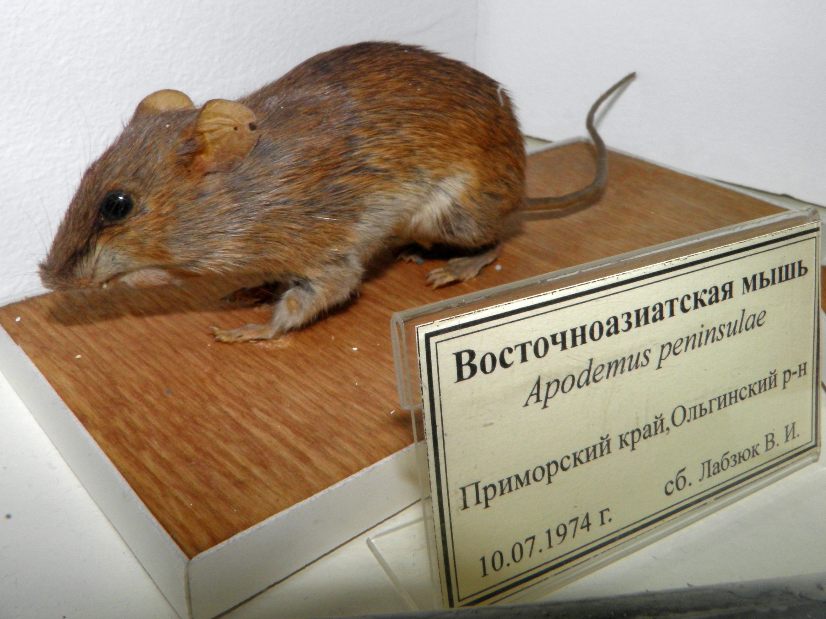 Восточноазиатская мышь (Apodemus peninsulae)